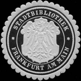 Sealing stamp Title: Stadtbibliothek Frankfurt am Main Description: schwarz, weiß, geprägt Place: Frankfurt/Main size: 4 cm